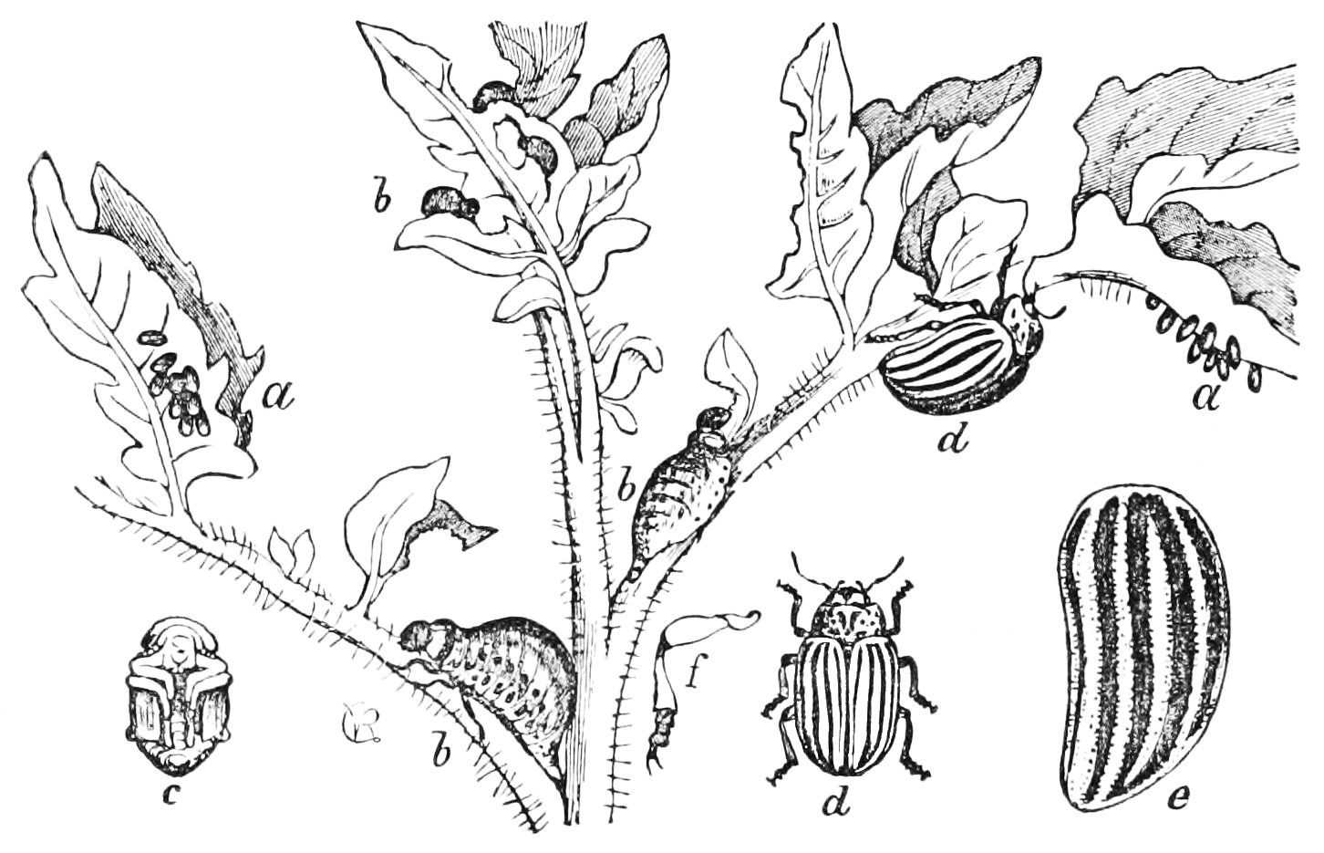 Colorado potato beetle